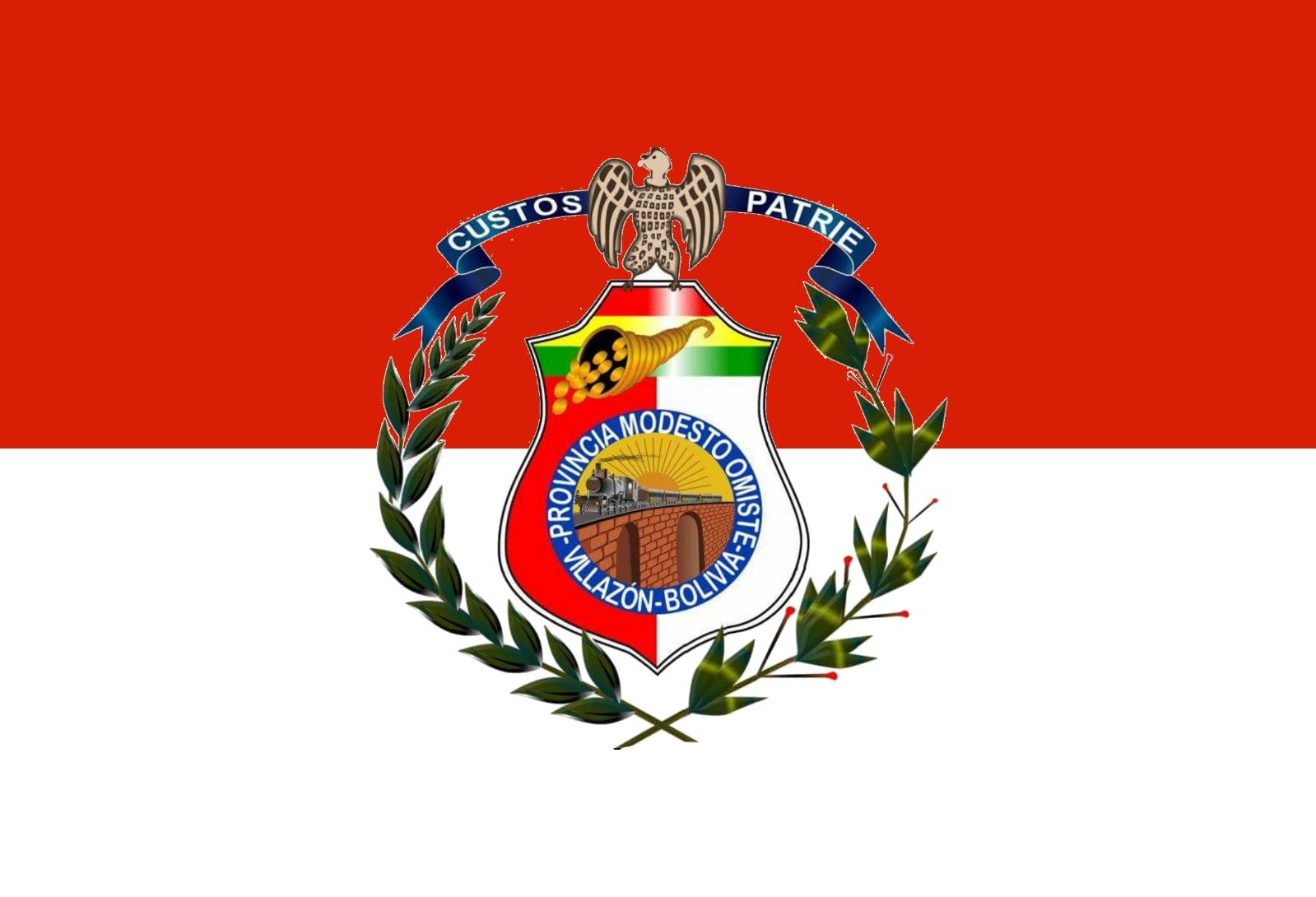 Bandera de la ciudad de Villazón